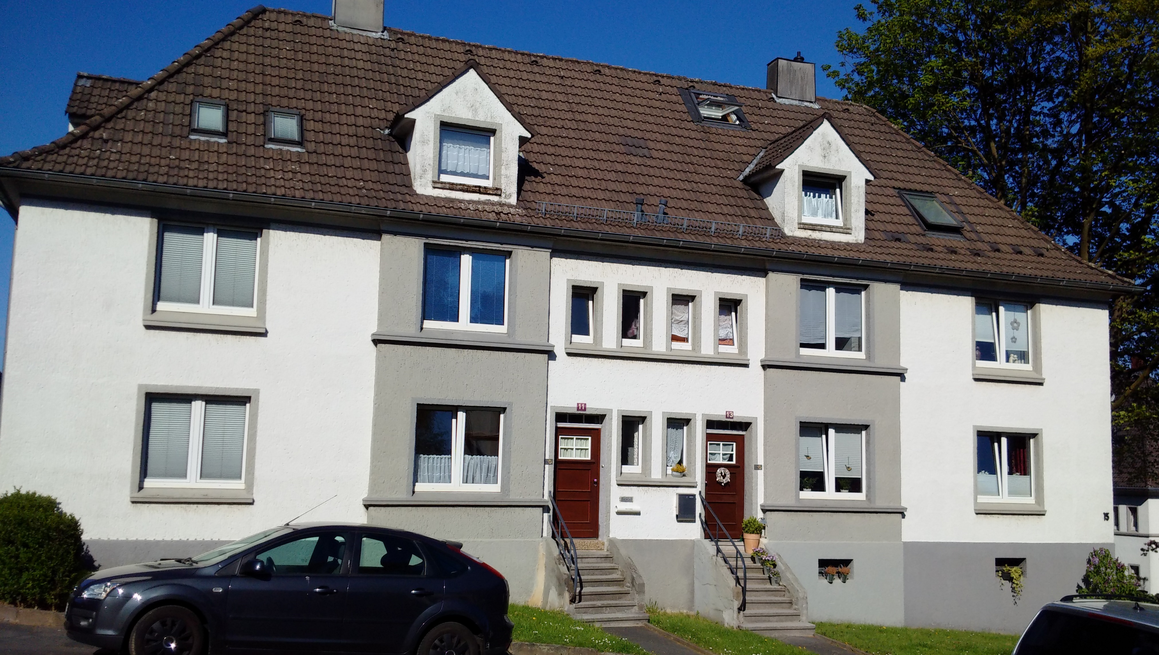 Haus in der Wohnsiedlung Kannenhof Solingen, aufgenommen im Frühling 2016